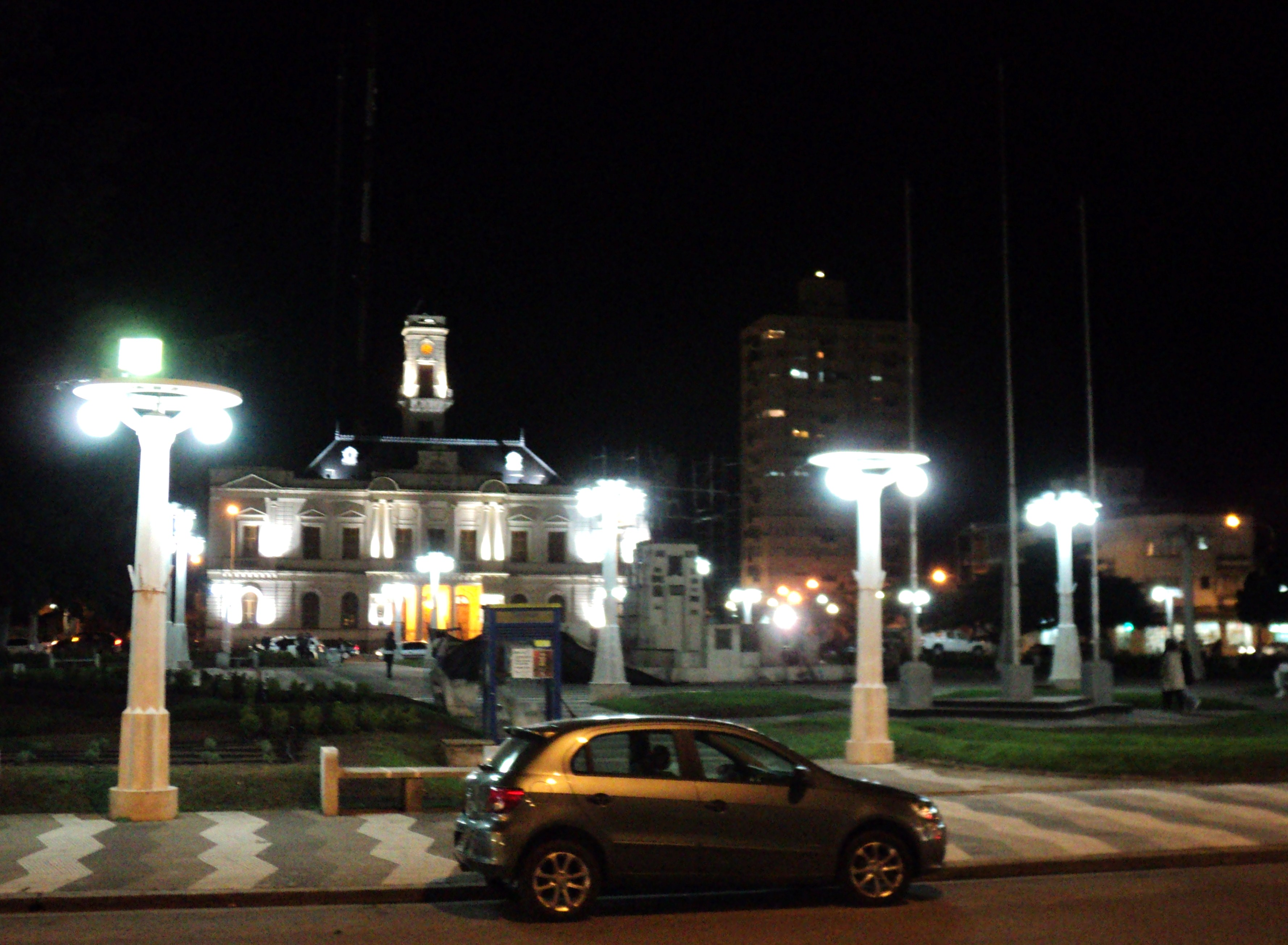 municipalidad de la ciudad e azul